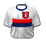 camiseta futbol retro 1961